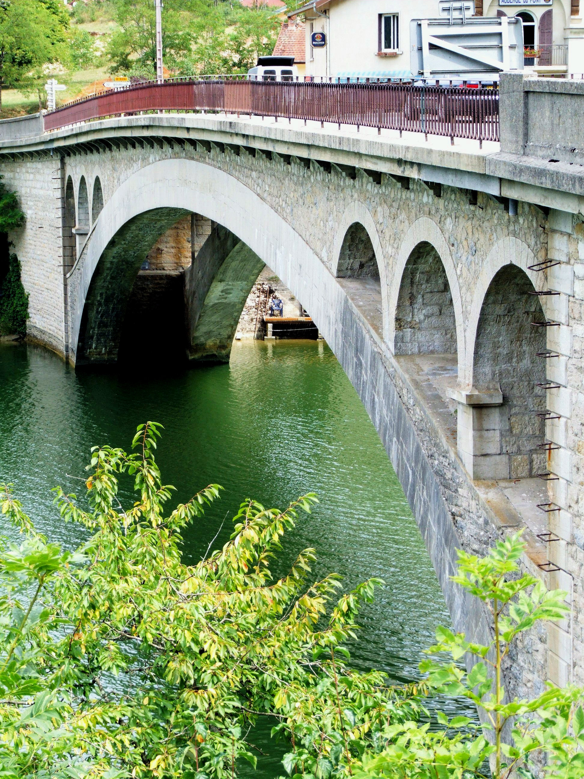 Pont de Thoirette sur l'Ain